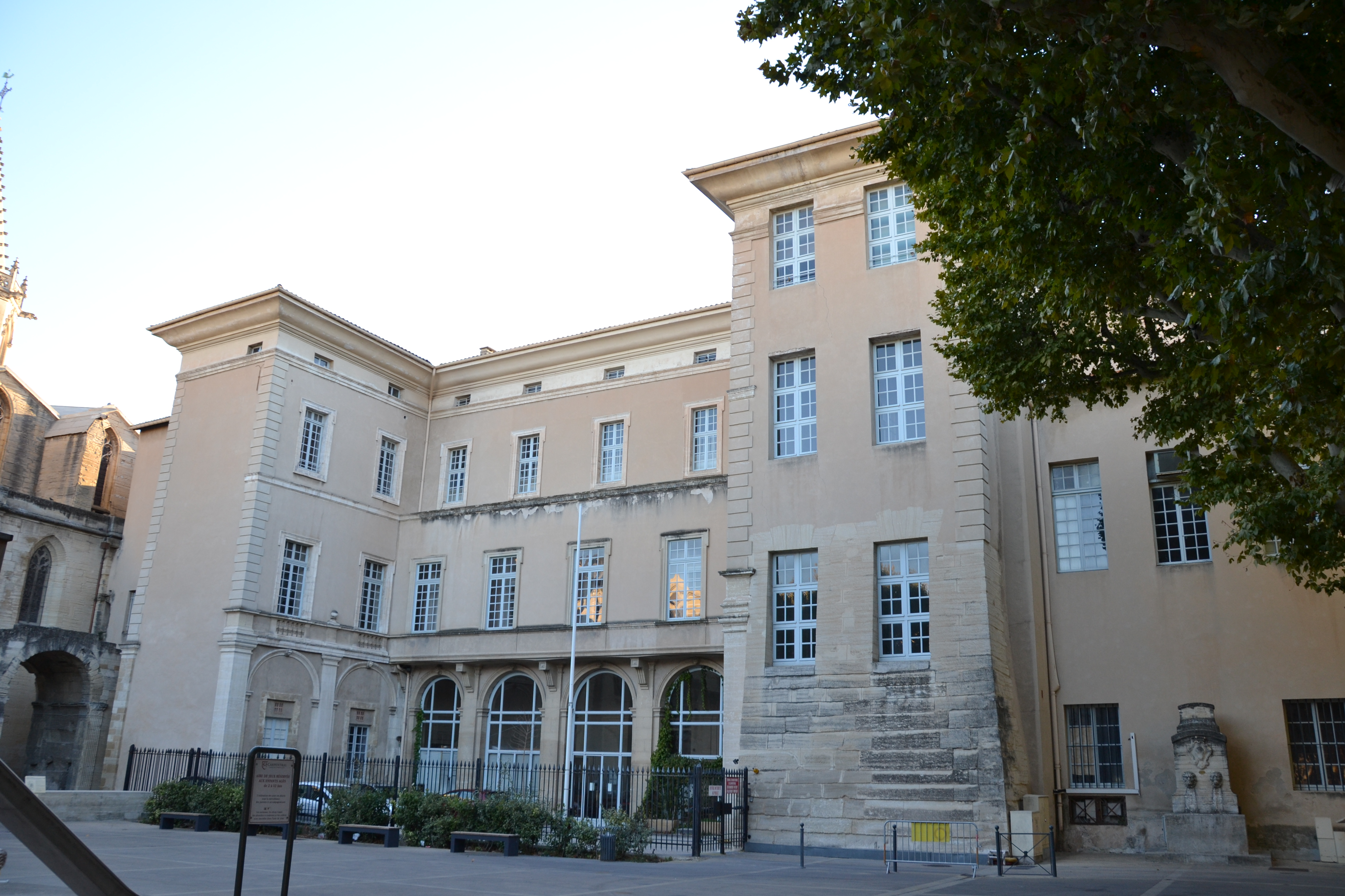 Palais épiscopal de Carpentras (ancien) (classement) .